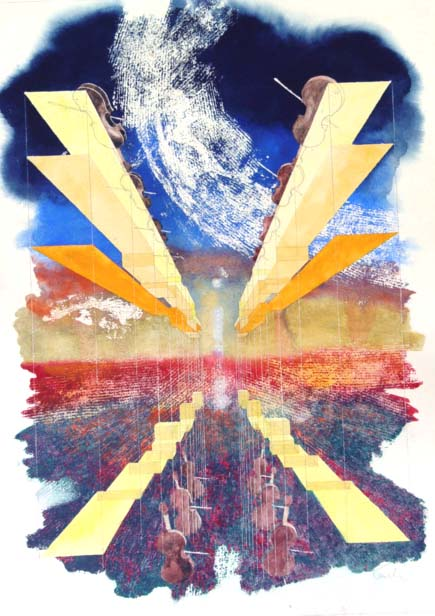 Serenáda_Andante od Petra Iljiče Čajkovského